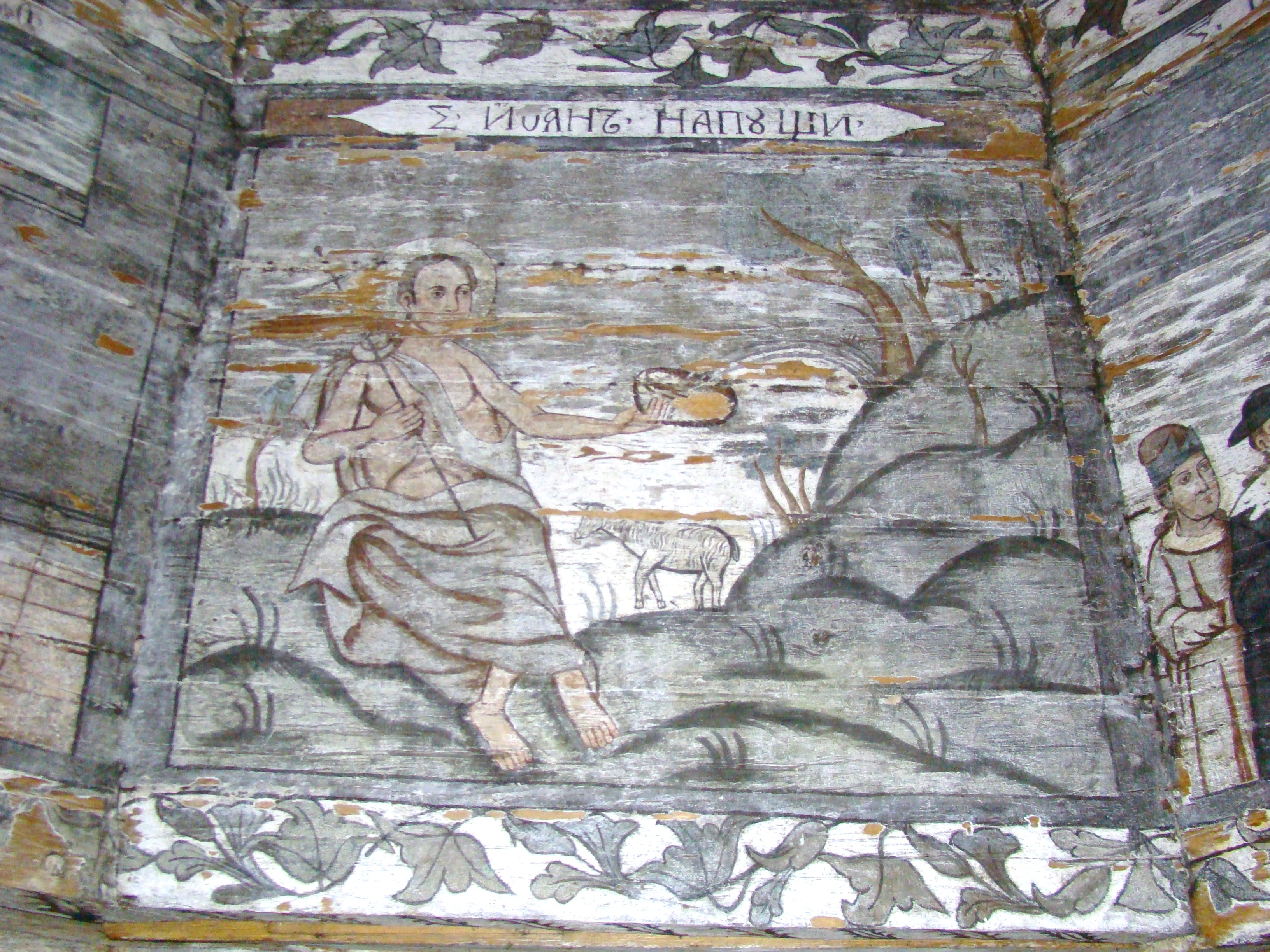 Biserica de lemn "Sfântul Nicolae", sat BOGDAN VODĂ